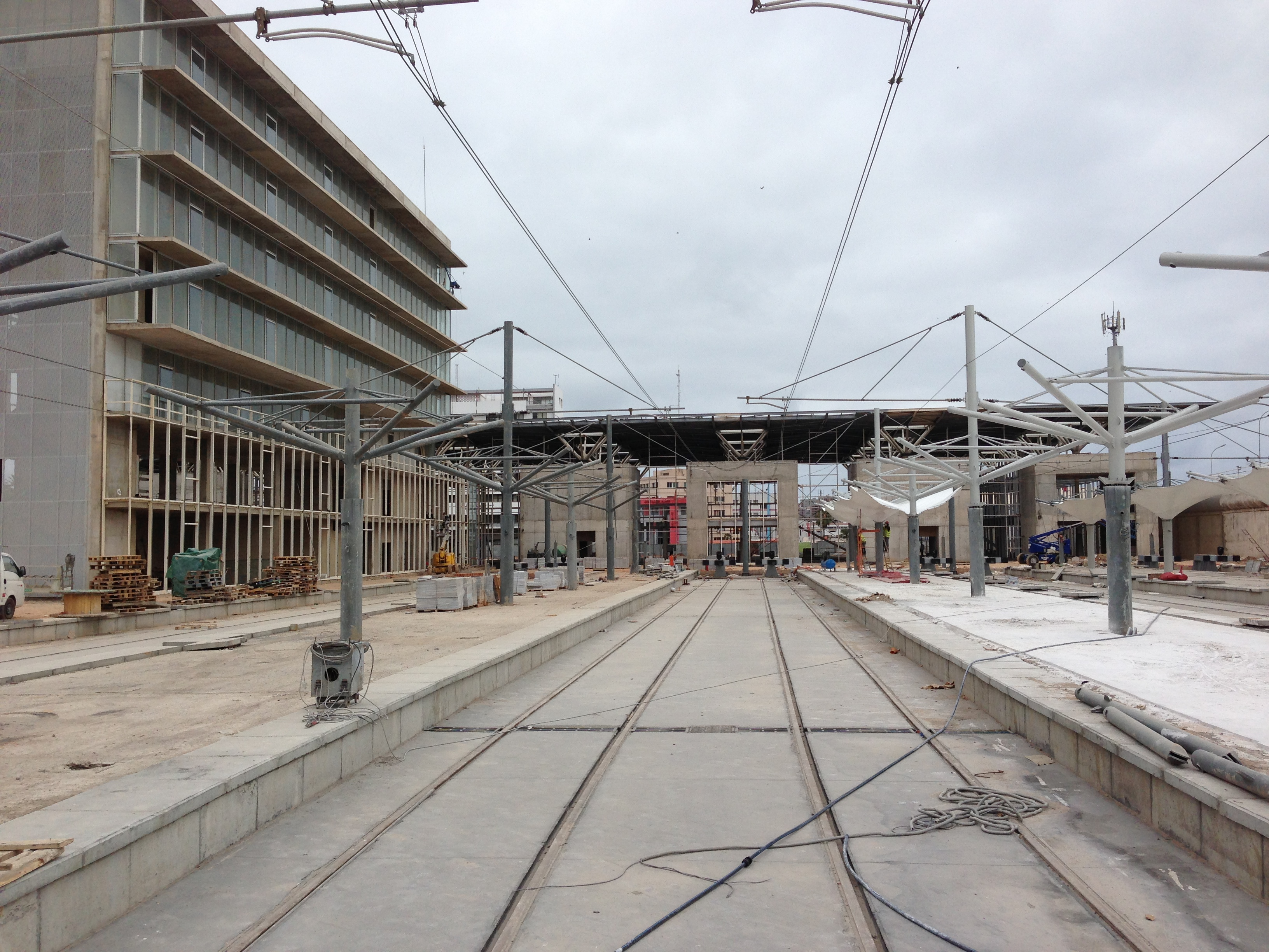 Travaux de rénovation et de réaménagement de la gare Casa-Port